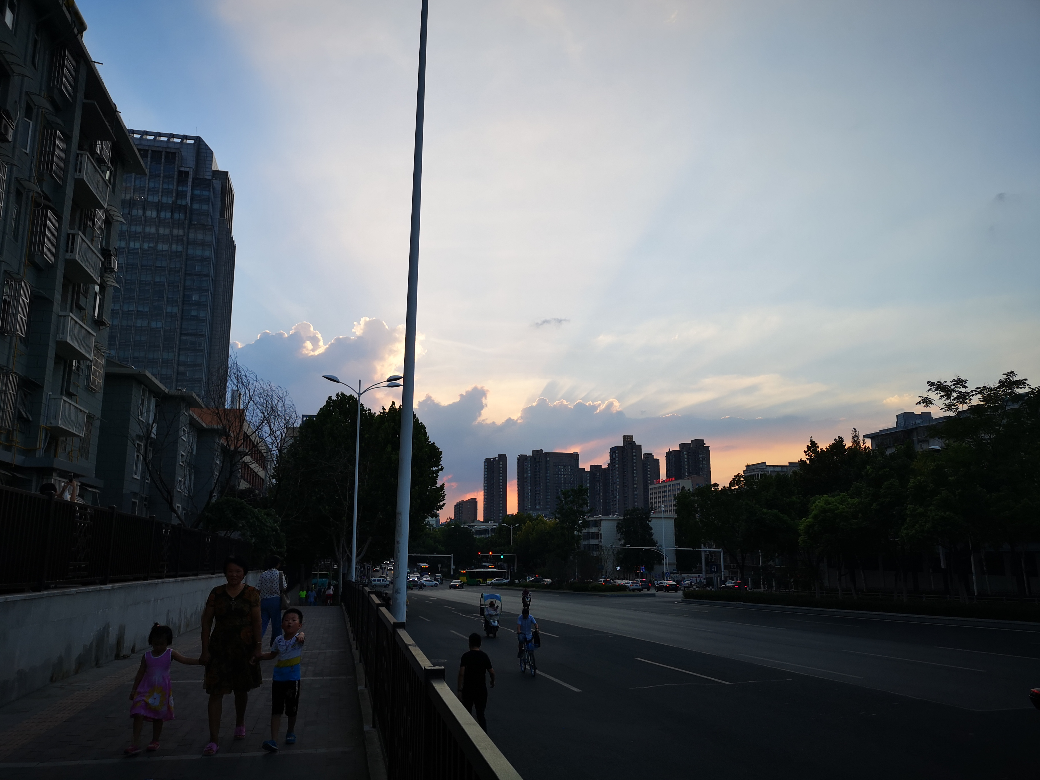 中文（中国大陆）: 合肥黄山路